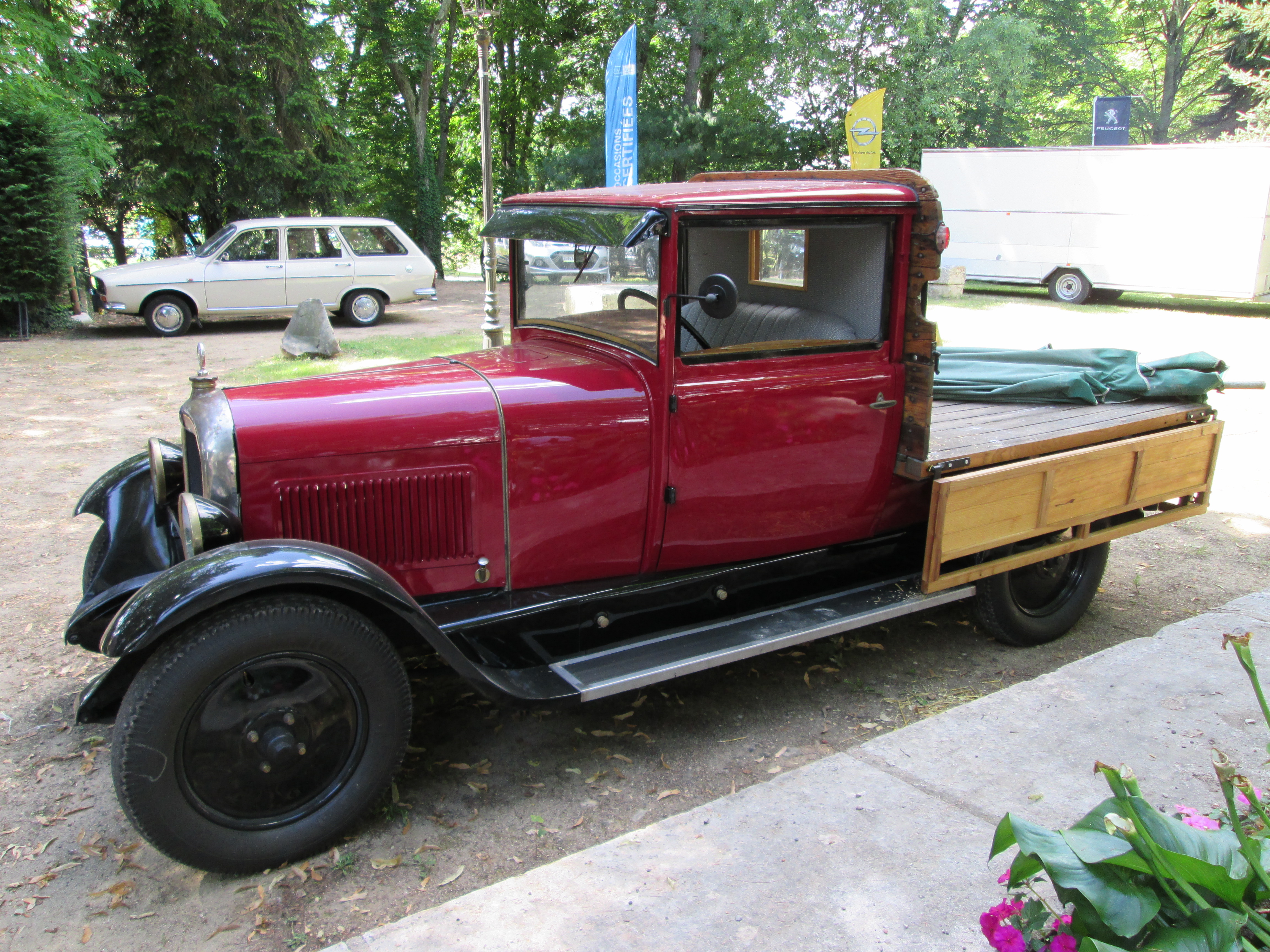 Citroën B14 normande (utilitaire ouvert, pick-up), avec plateau à ridelles en bois.